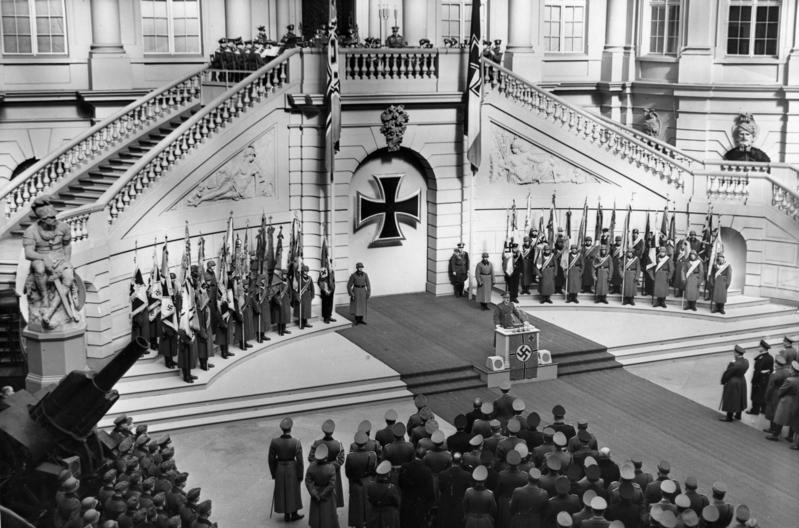 Heldengedenktag 1940, Der Staatsakt im Lichthof des Zeughauses. Der Führer bei seiner Gedenkrede. 10.3.40 WB [Weltbild]